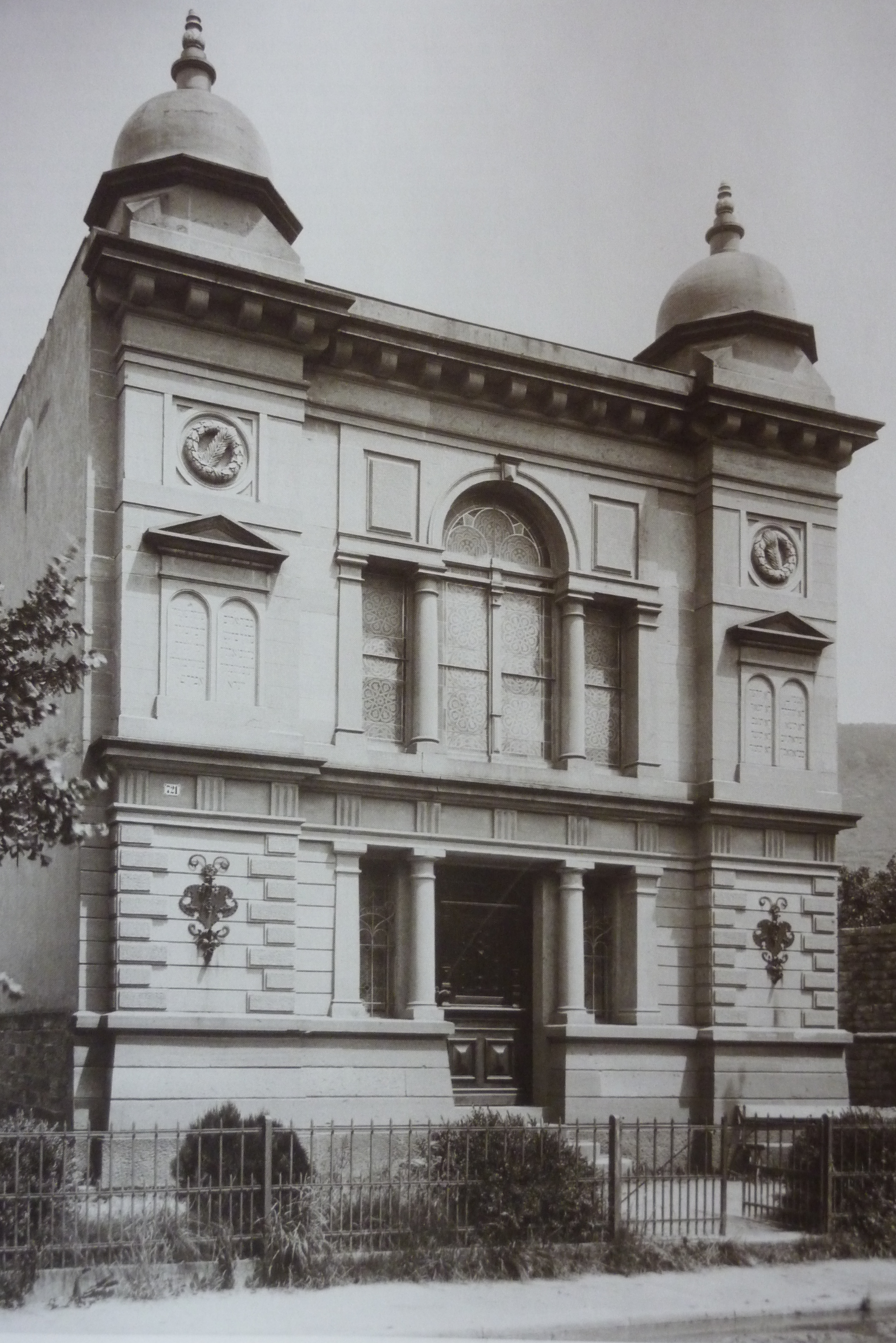 Synagoge in Ettlingen, Architekt: Alexander Kiefer, erbaut 1889, abgerissen 1939